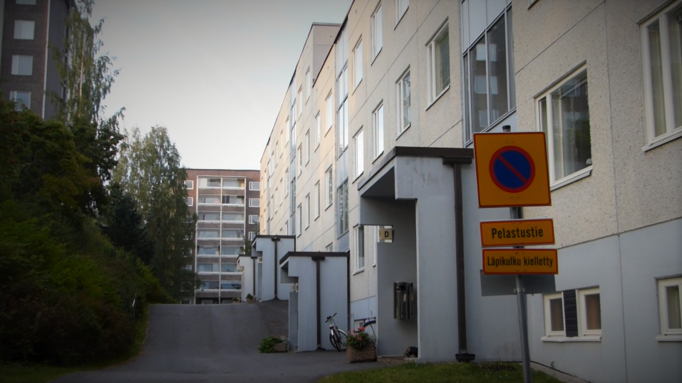 Kerrostaloja Kangaslammella